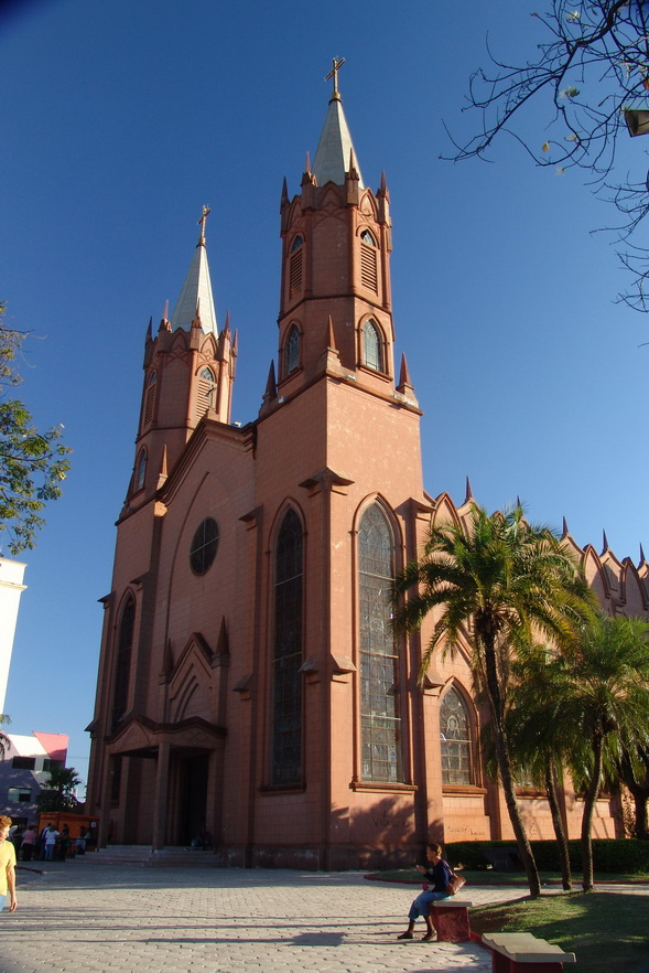 Catedral Senhor Bom Jesus, município de Ourinhos, estado de São Paulo, Brasil.